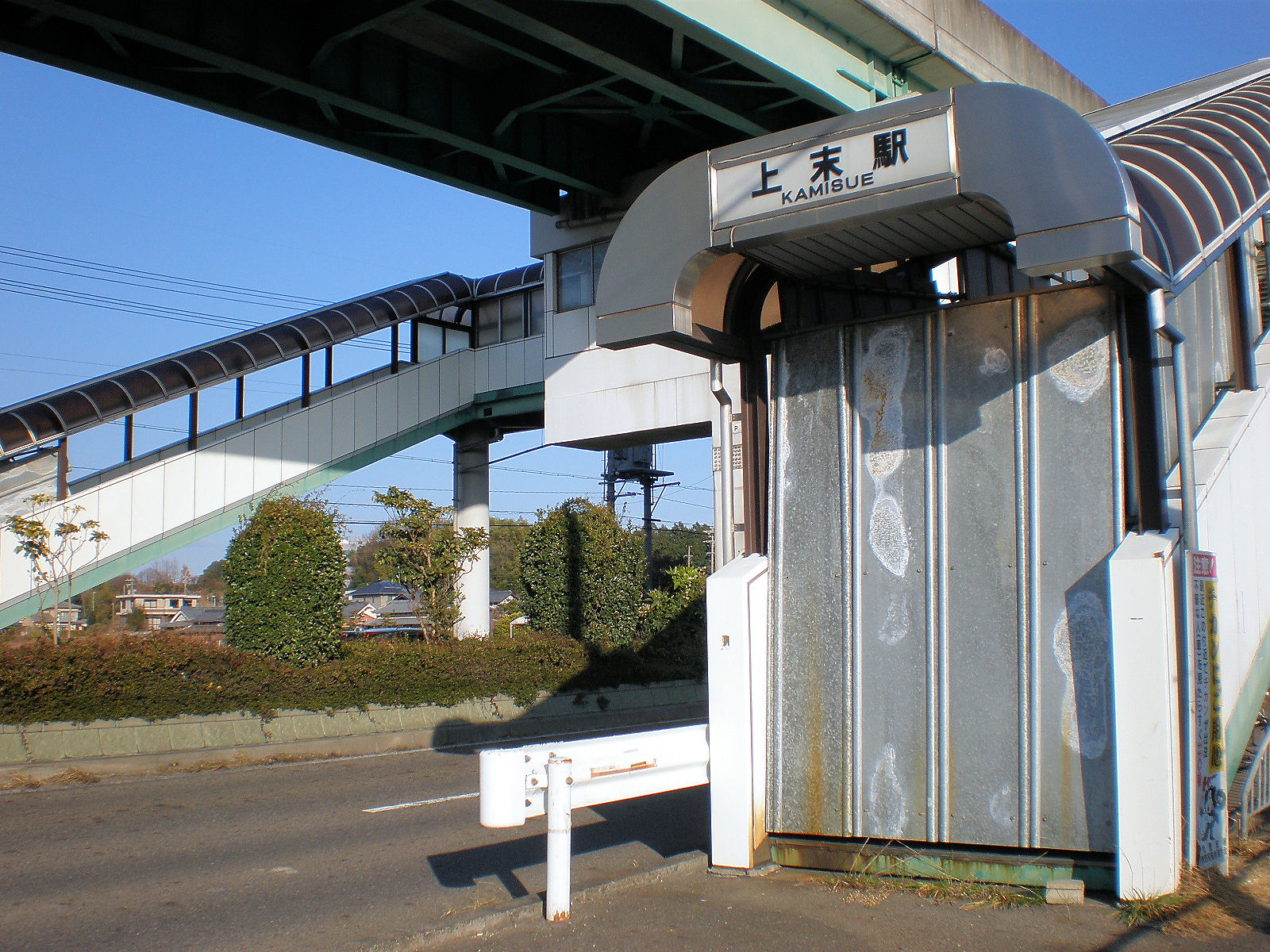 愛知県小牧市の廃駅・上末駅の南口